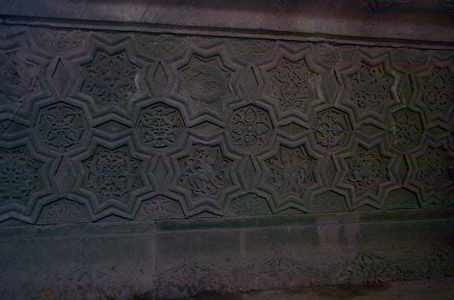 Makaravank Monastery in Armenia.